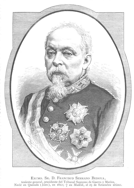 Retrato de Francisco Serrano Bedoya, en La Ilustración Española y Americana.